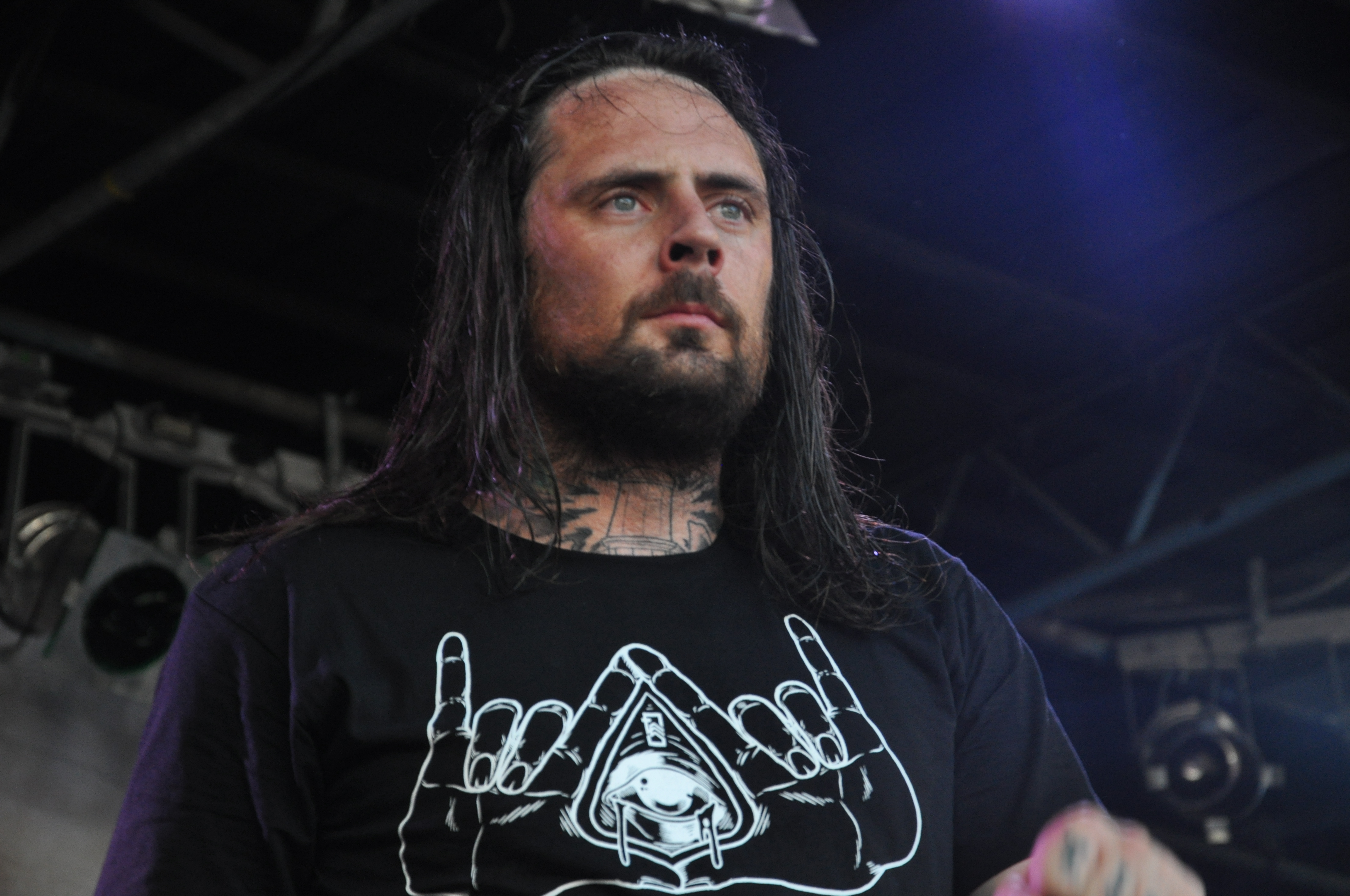 Thy Art Is Murder auf dem Summerblast Festival 2014